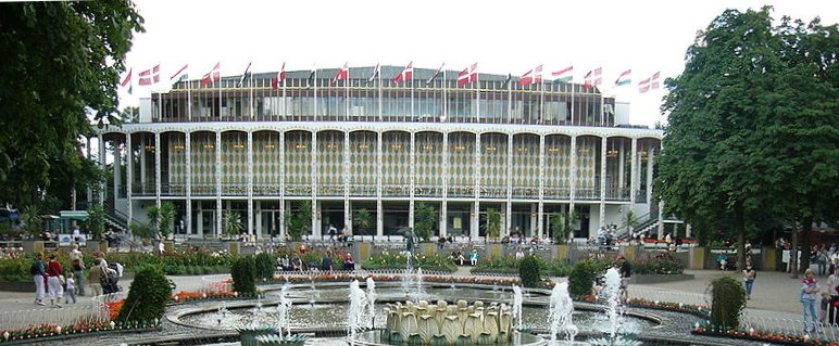 Sala de Concertos do Tivoli, Copenhague